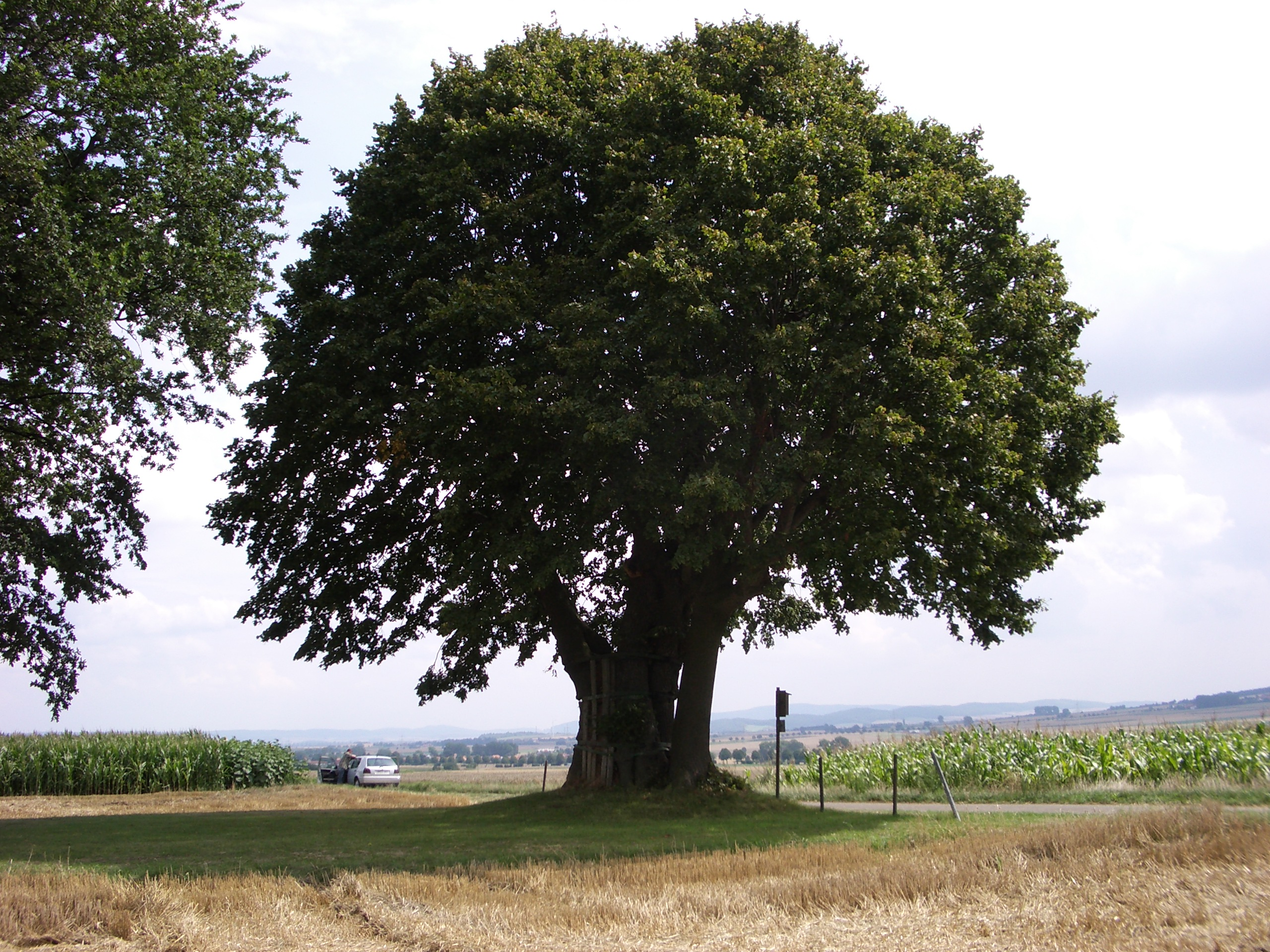 Tilly-Linde in Hemmendorf, Naturdenkmal (ND-HM 051) im Landkreis Hameln-Pyrmont, Niedersachsen